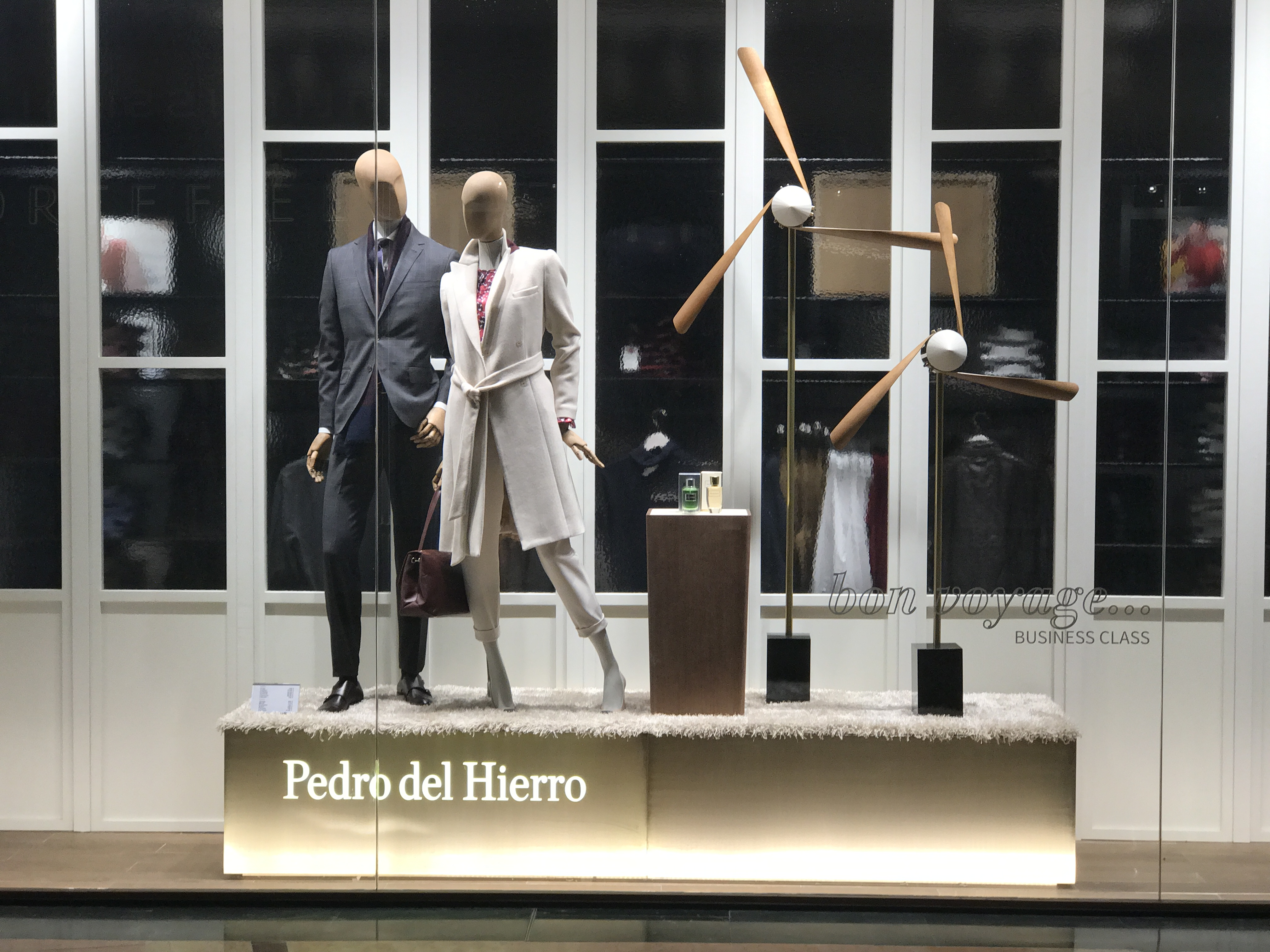 Escaparate Pedro del Hierro